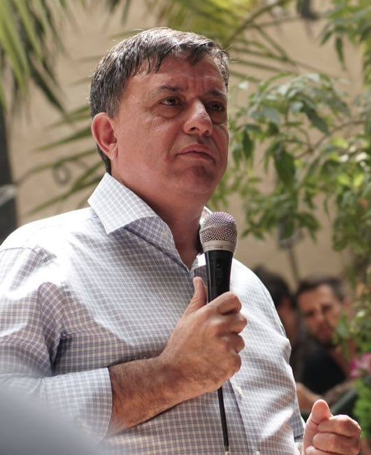 אבי גבאי, שר הגנת הסביבה לשעבר ומועמד לראשות מפלגת העבודה, באסיפת בחירות